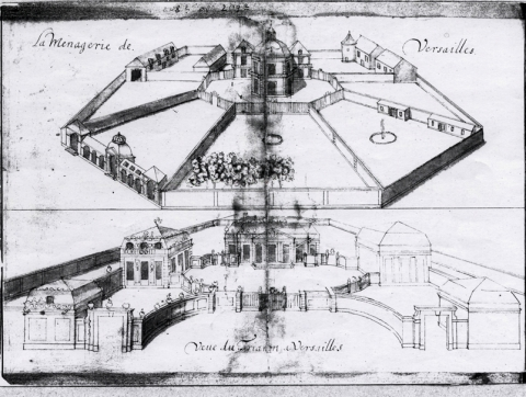 Christoph Pitzler Reisetagebuch 1685-1688 Folio 208. Menagerie in Versailles. Trianon de Porcelaine